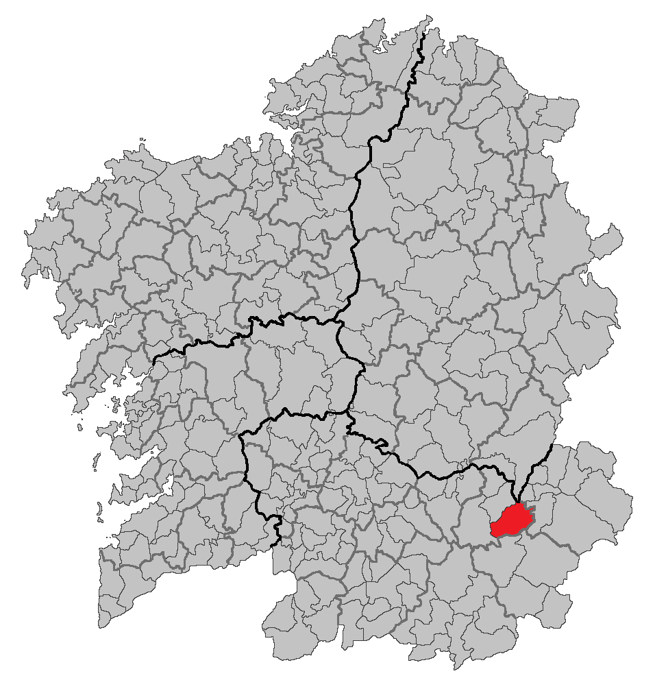 Mapa coa localización do concello de Manzaneda.